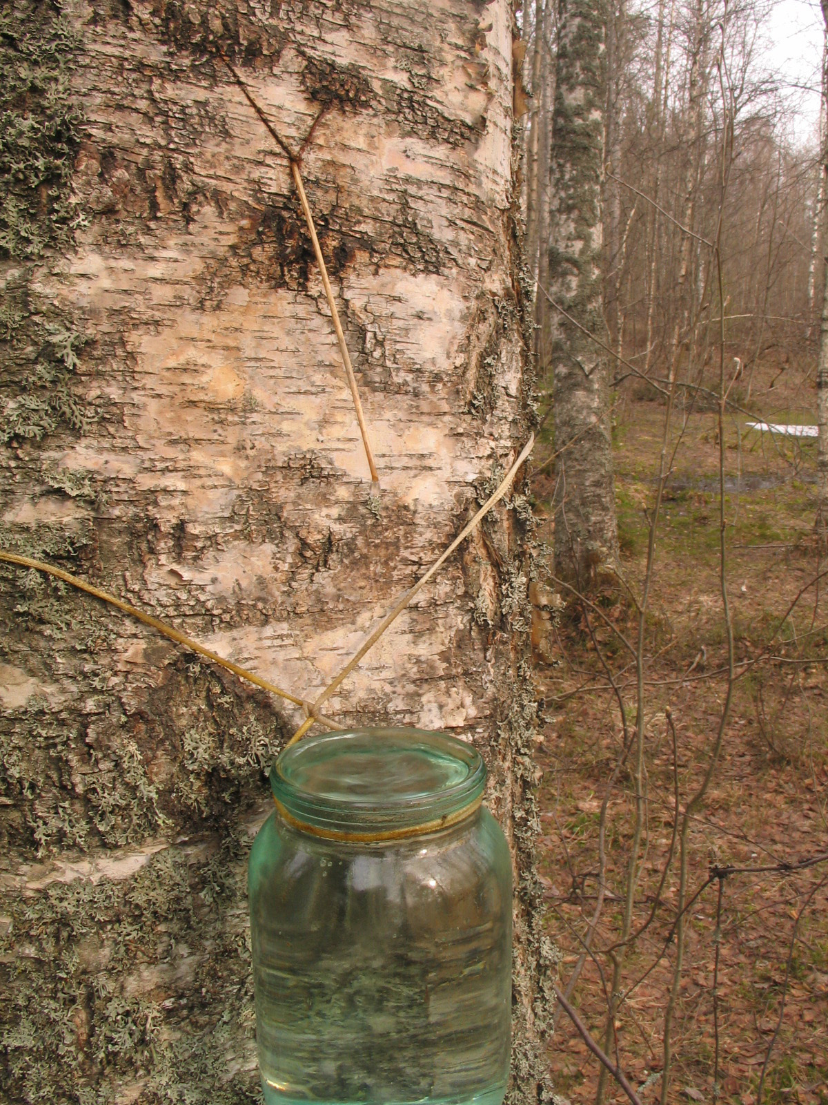 Сбор березового сока